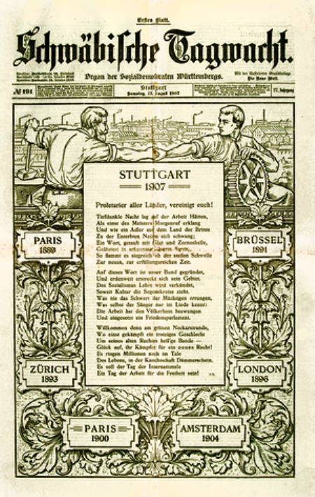 Titelblatt der Schwäbischen Tagwacht zum Beginn des Internationalen Sozialistenkongresses am 18. August 1907 in Stuttgart